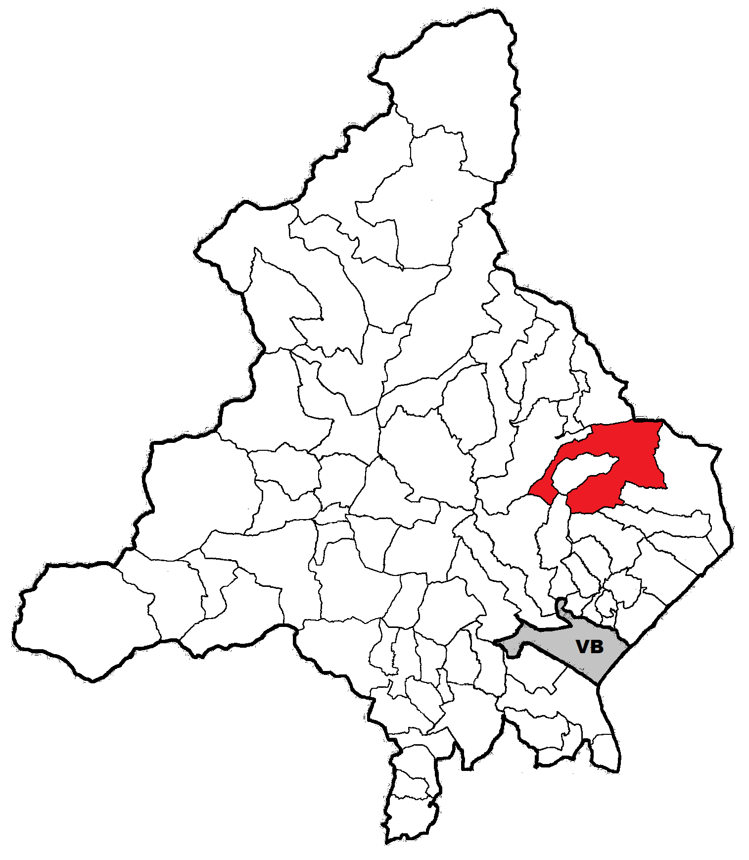 Posizione del comune nella provincia del Verbano Cusio Ossola (Verbania)